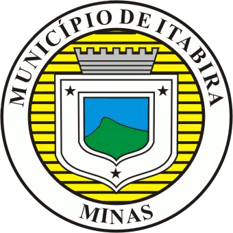 Brasão de Itabira, em versão pequena